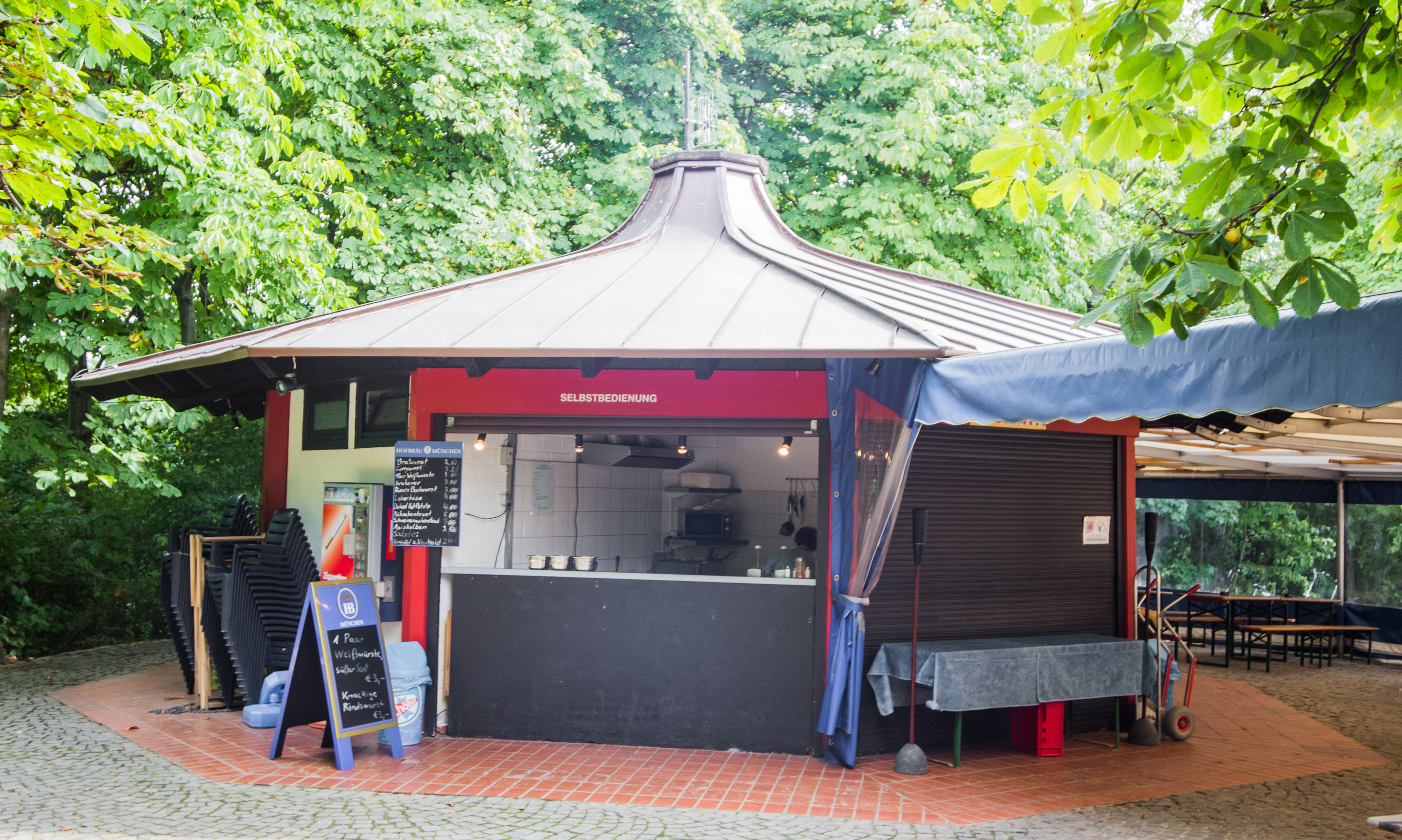 Haus am Rhein, Elsa-Brändström-Straße 74, Bonn-Beuel-Limperich: Pavillon (Biergarten "Blauer Affe")